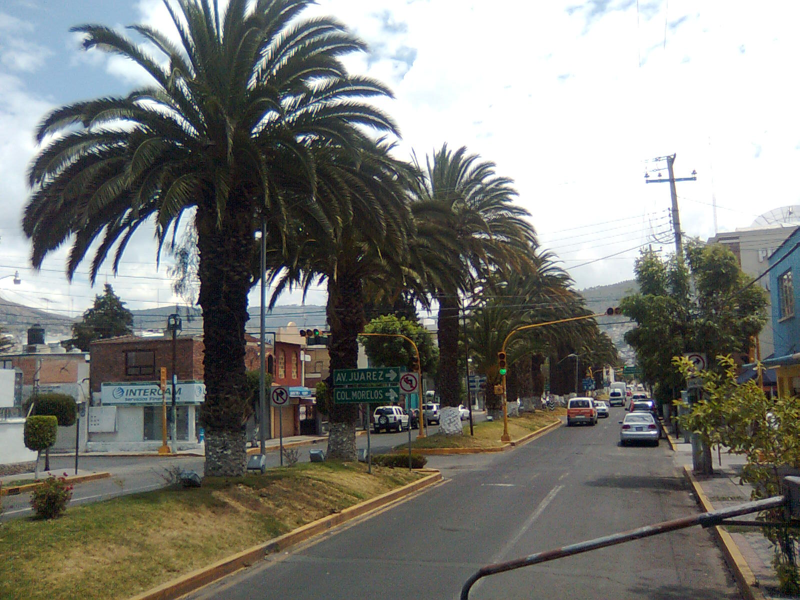 Av revolucion principal avenida de fujo de automoviles (doble via)